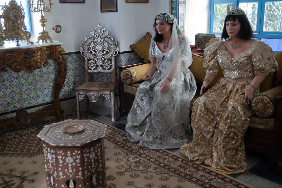 Miasteczko Sidi Bou Said. Muzeum Dar el Annabi